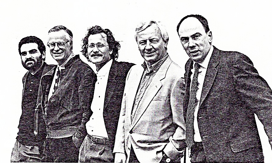 Foto von einem Workshop, DOMUS nr. 753